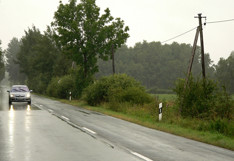 Straße irgendwo im Lichtenmoor, Landkreis Nienburg/Weser, Niedersachsen